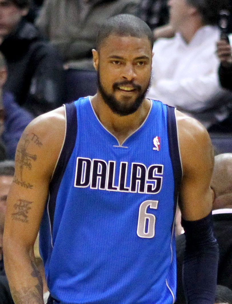 Wizards v/s Mavericks 02/26/11